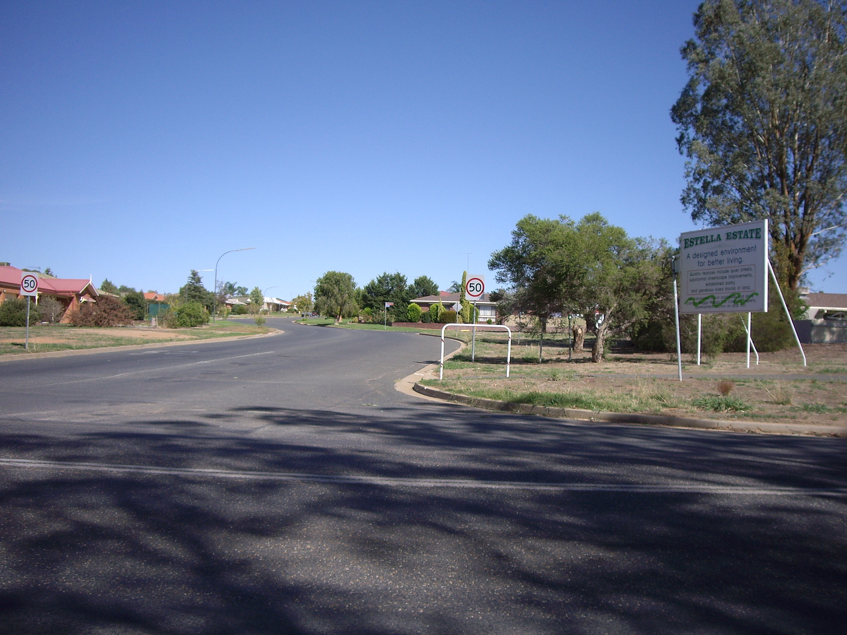 Estella streetscape